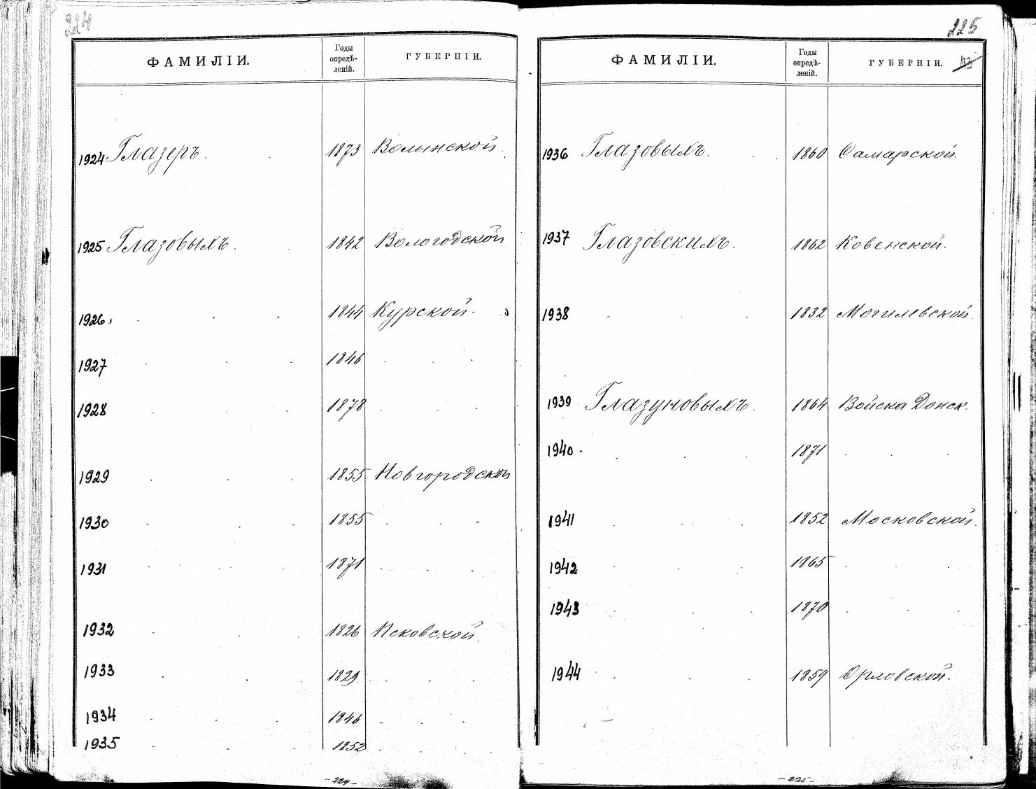 Это скан, взятый из открытого источника РГИА ( даёт перечень губерний, в родовые книги которых внесён дворянский род Глазовых.